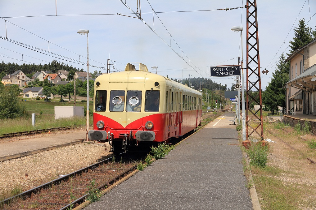 Gare de Saint-Chély-d'Apcher lors d'une circulation spéciale en juin 2011, Lozère, France.